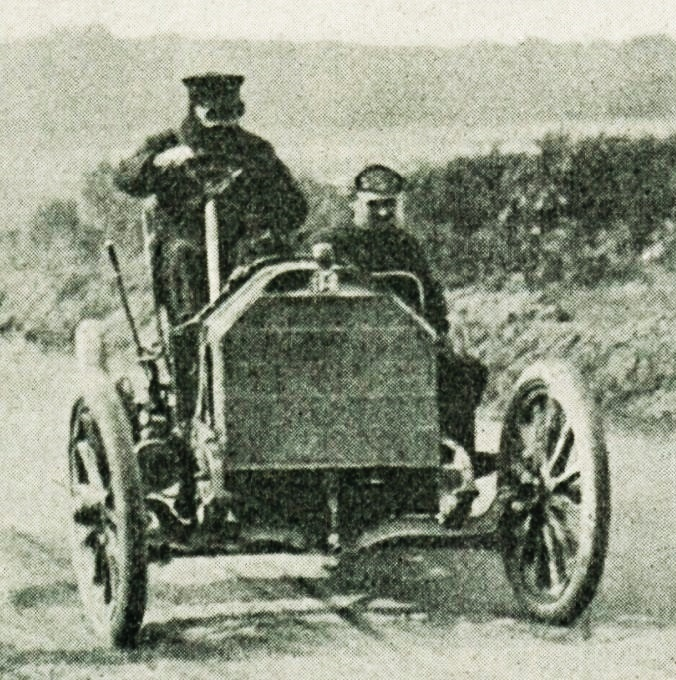 Willy Pöge, vainqueur du Prix de l'Empereur sur l'hippodrome de Francfort (l'Oberforsthaus) dans la course des 10 miles, en juin 1904 sur Mercedes - La Vie au Grand Air du 30 juin 1904, p.528 (article Les deux autodromes de Georges Prade (1875-1920))